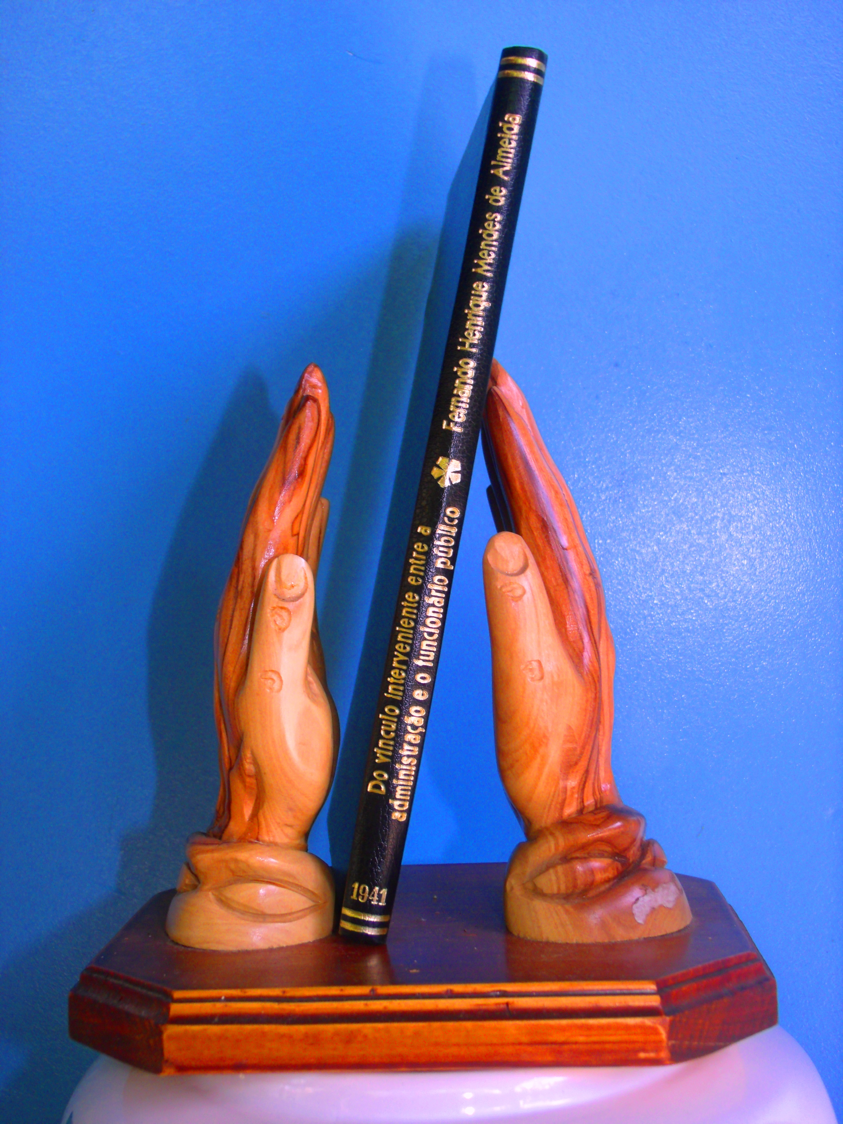 Artesanato com o livro: Do vínculo interveniente entre a administração e o funcionário publico, obra de 1941 do jurista brasileiro, Fernando Henrique Mendes de Almeida, sobre Direito Administrativo Brasileiro.